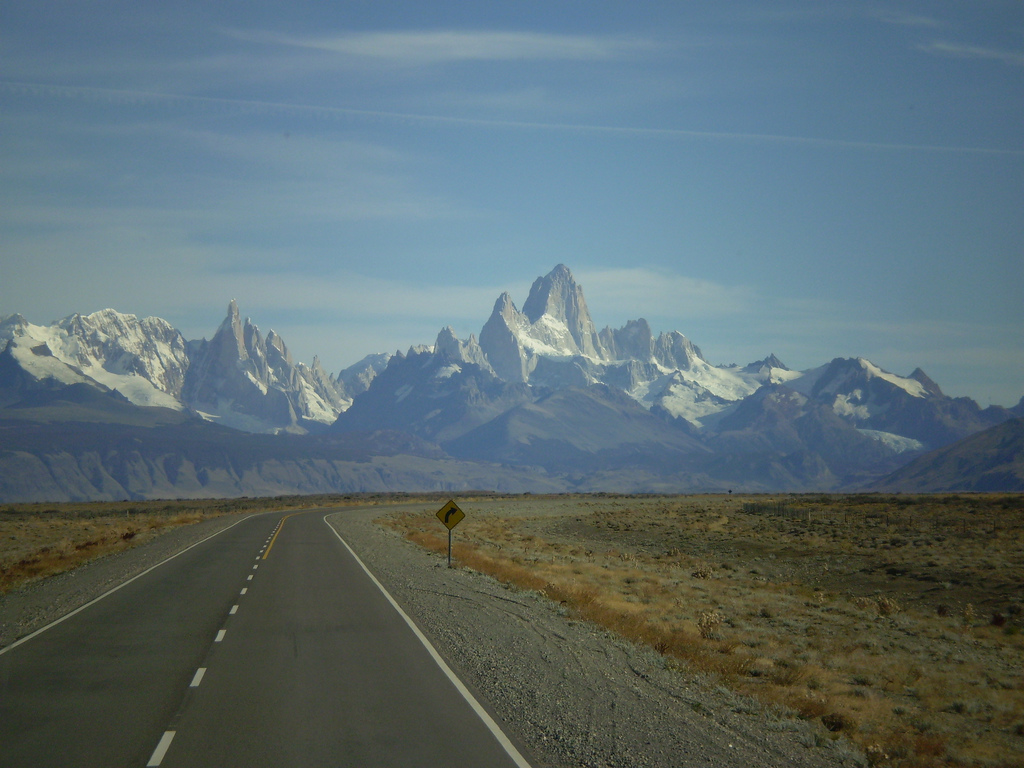 Ruta Provincial 23 en El Chaltén, Santa Cruz, Argentina. A la izquierda se encuentra el Cerro Torre y a la derecha el Cerro Chaltén.